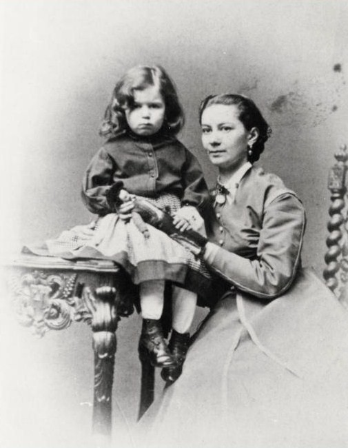 Баронесса Ольга Михайловна Мейендорф (1837—1926) с сыном Александром (1869—1964)